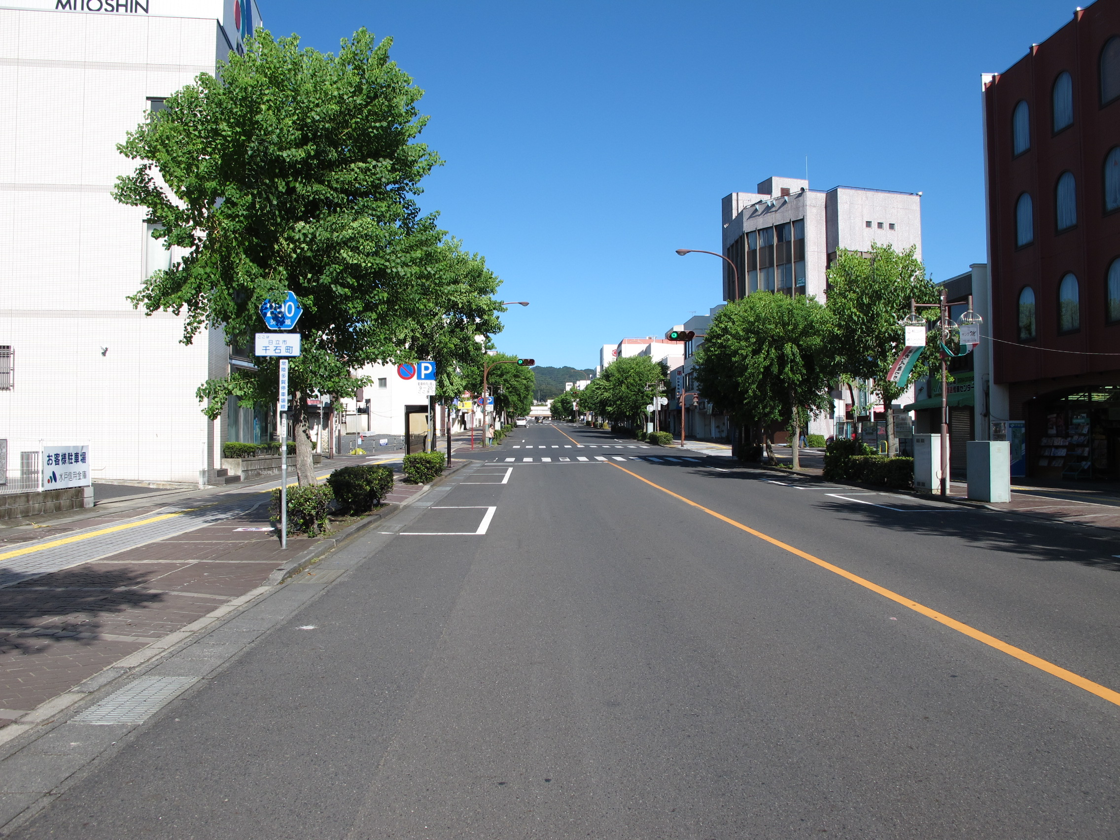 茨城県道290号日立多賀停車場線（日立市千石町）